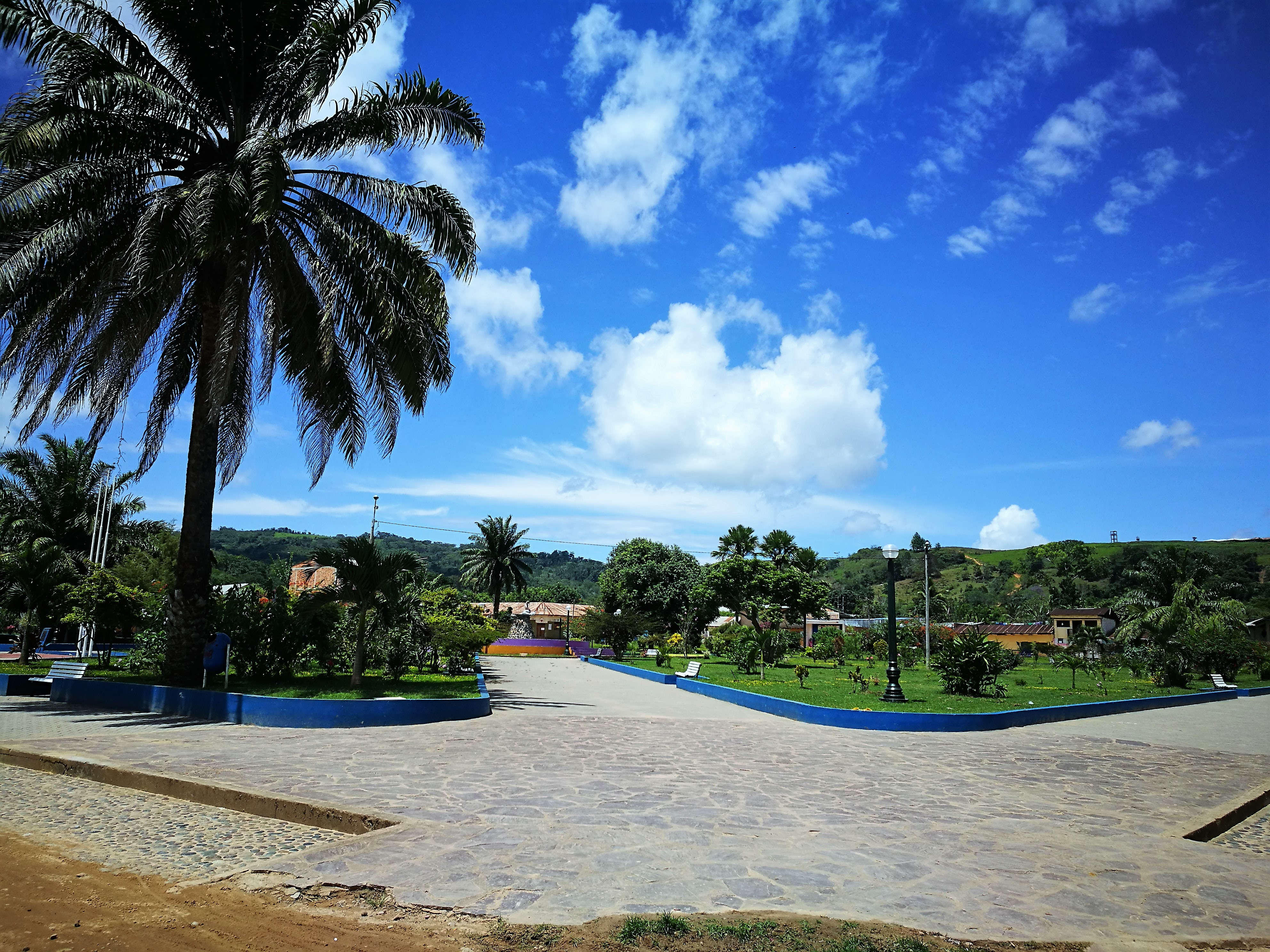 Plaza de Armas de Sauce, San Martín